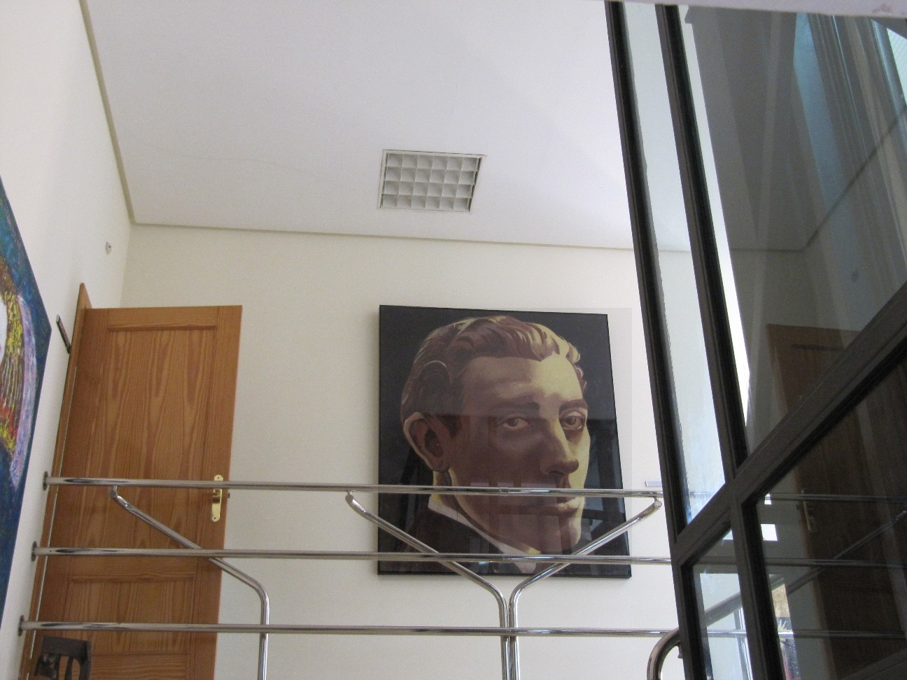 Retrato de Renau depositado en el MI Ayuntamiento de Requena.